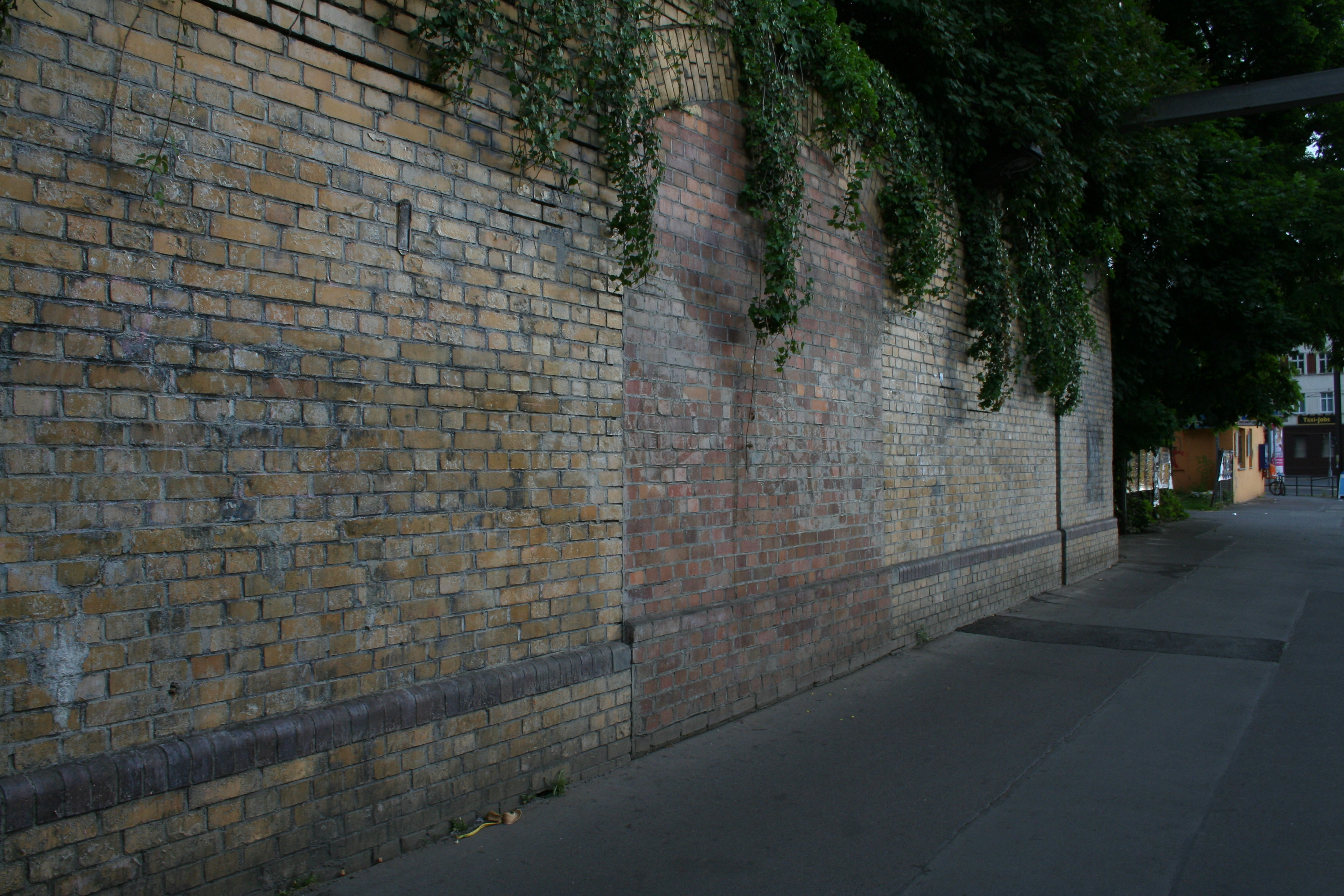 Bahnhof SchöneweideThis is a photograph of an architectural monument.